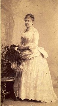 Prielle Kornélia (1826-1906) 60 éves korában ismeretlen szerepben.